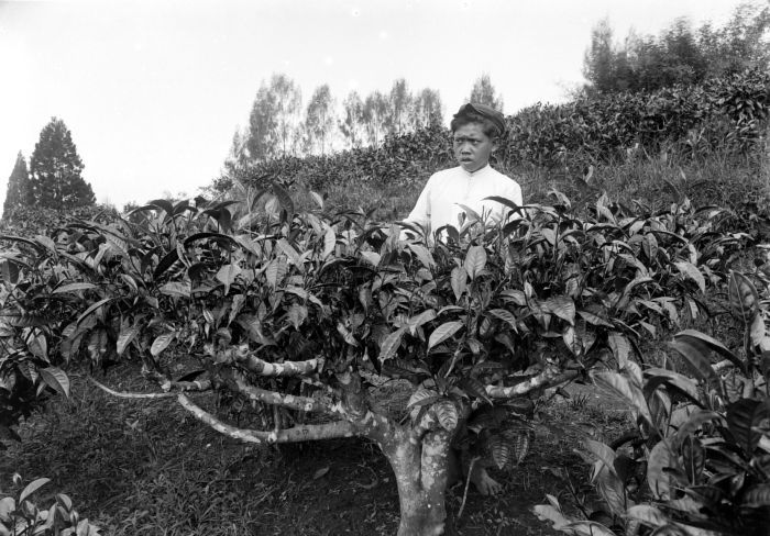 Negatief. Theeheester in tafelvorm